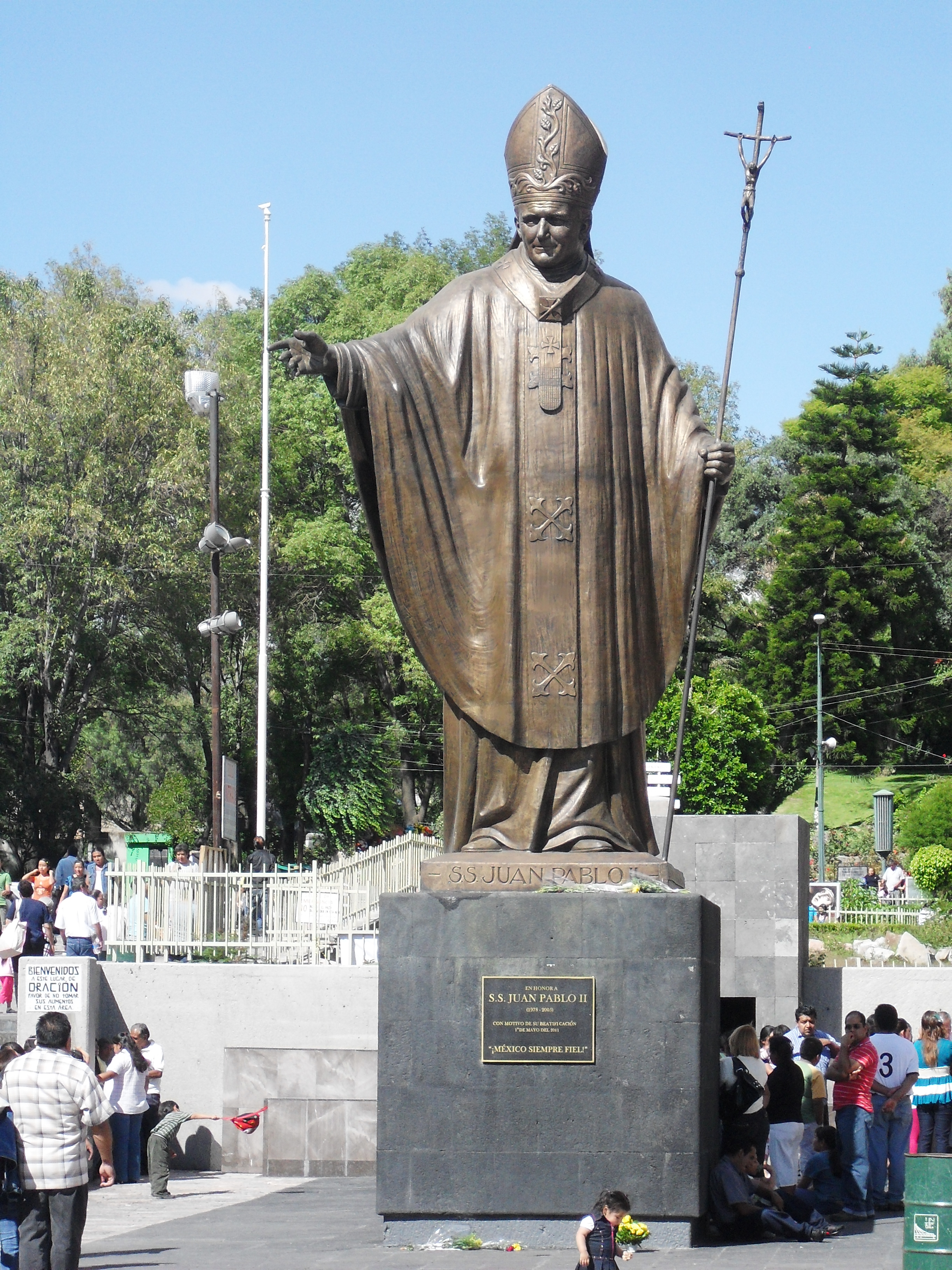 Estatua de Juan Pablo II hecha de llaves fundidas